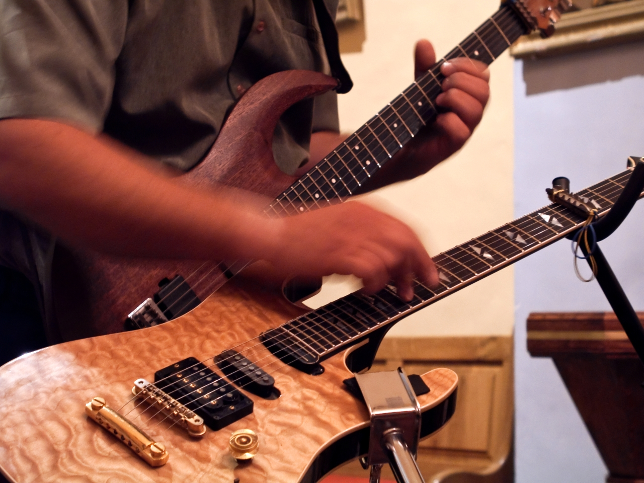 Darko Jurković Charlie